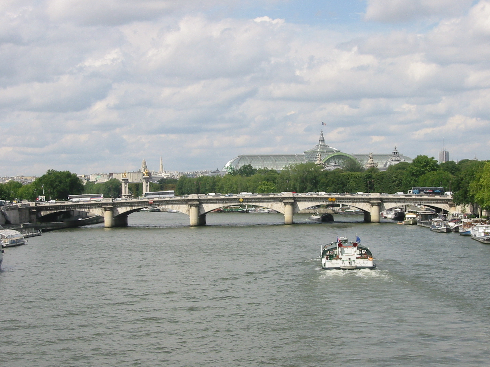 Pont de la Concorde vu de la passerelle Solférino